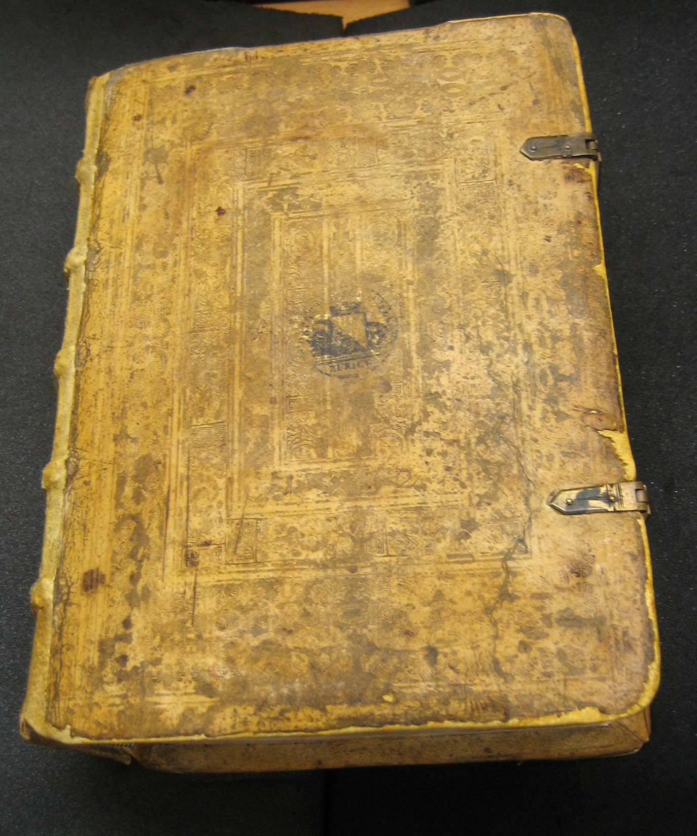 Die Tschachtlanchronik (Original)